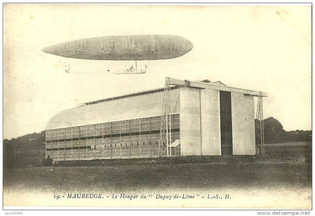 Photographie noir et blanc, reproduite sur carte postale, du dirigeable Dupuy-de-Lôme et de son hangar à Maubeuge.